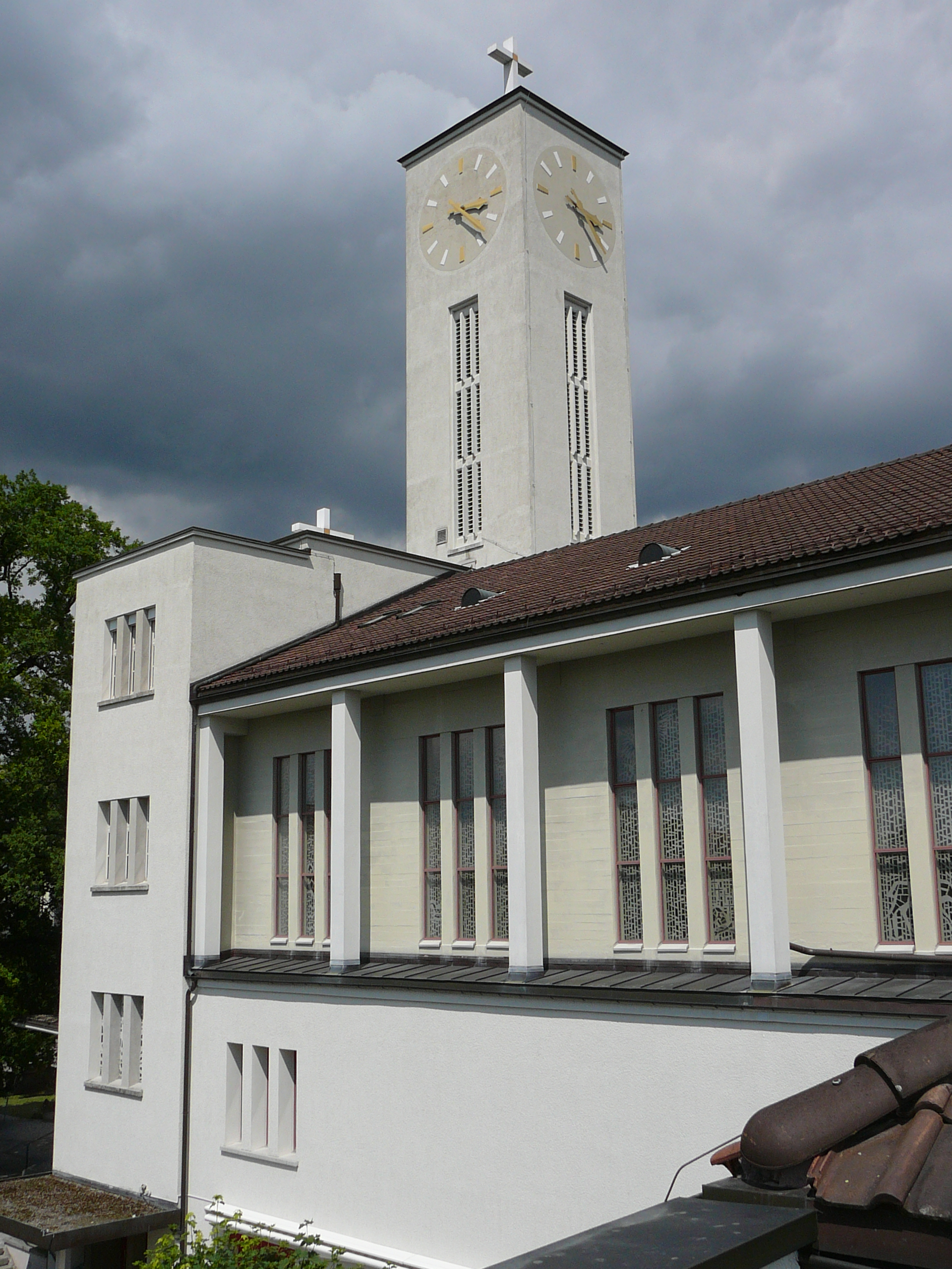 Römisch-katholische Kirche Erlöser Zürich-Riesbach, Blick von Süden